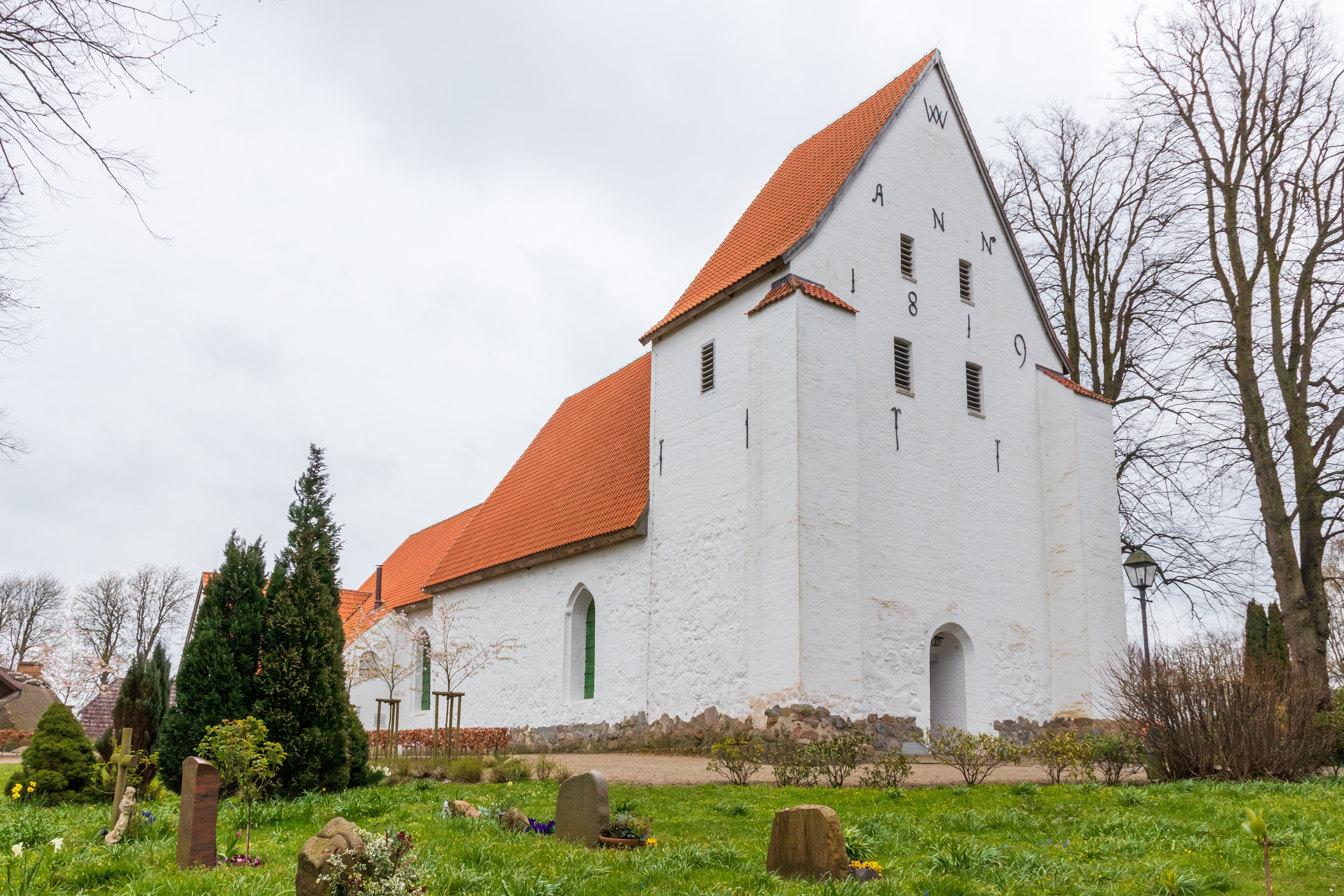 Die romanische Feldsteinkirche in Sieseby.